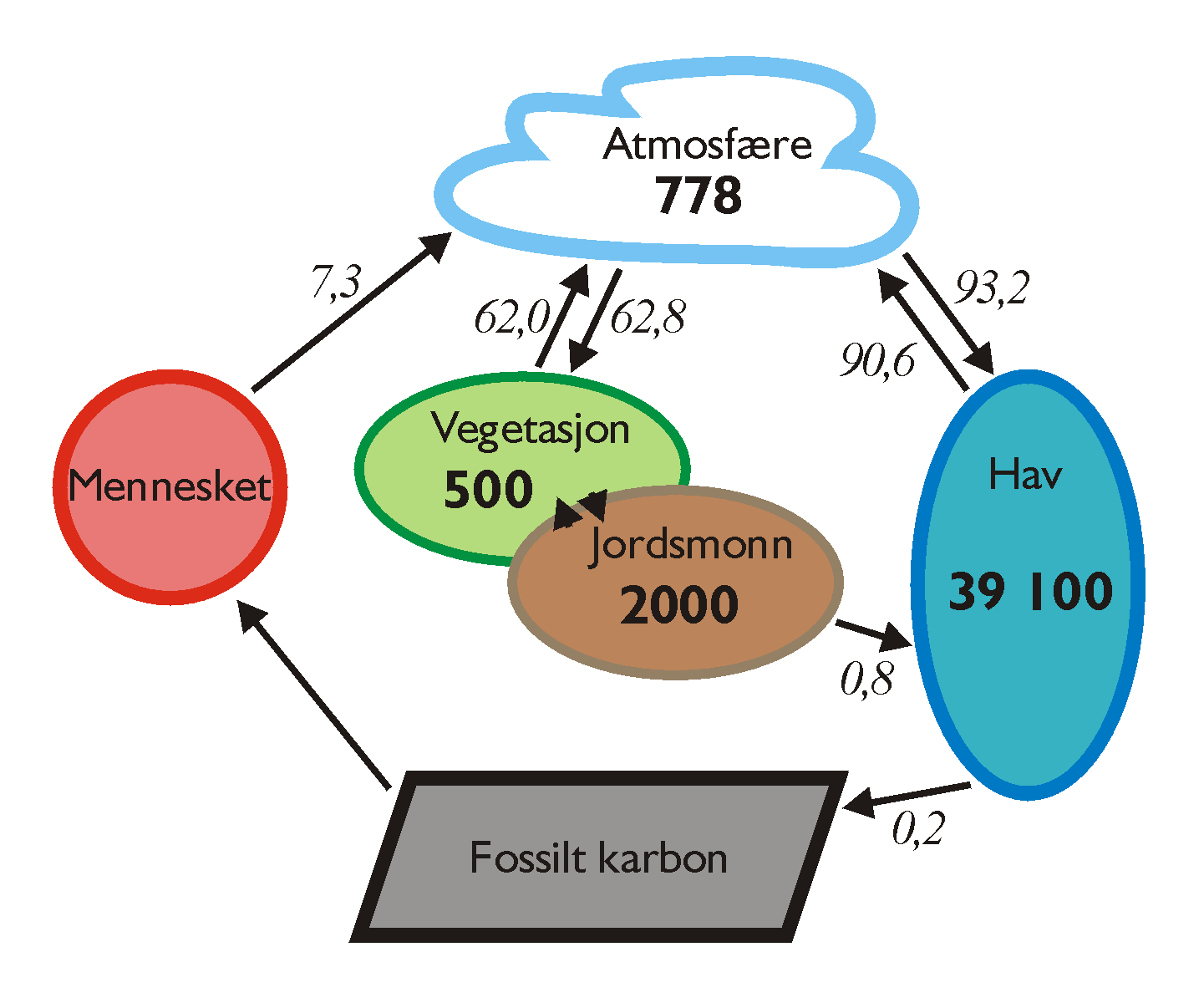 Karbonkretsløpet i 2005 – tall angir mengder og flyt av karbon i gigatonn.